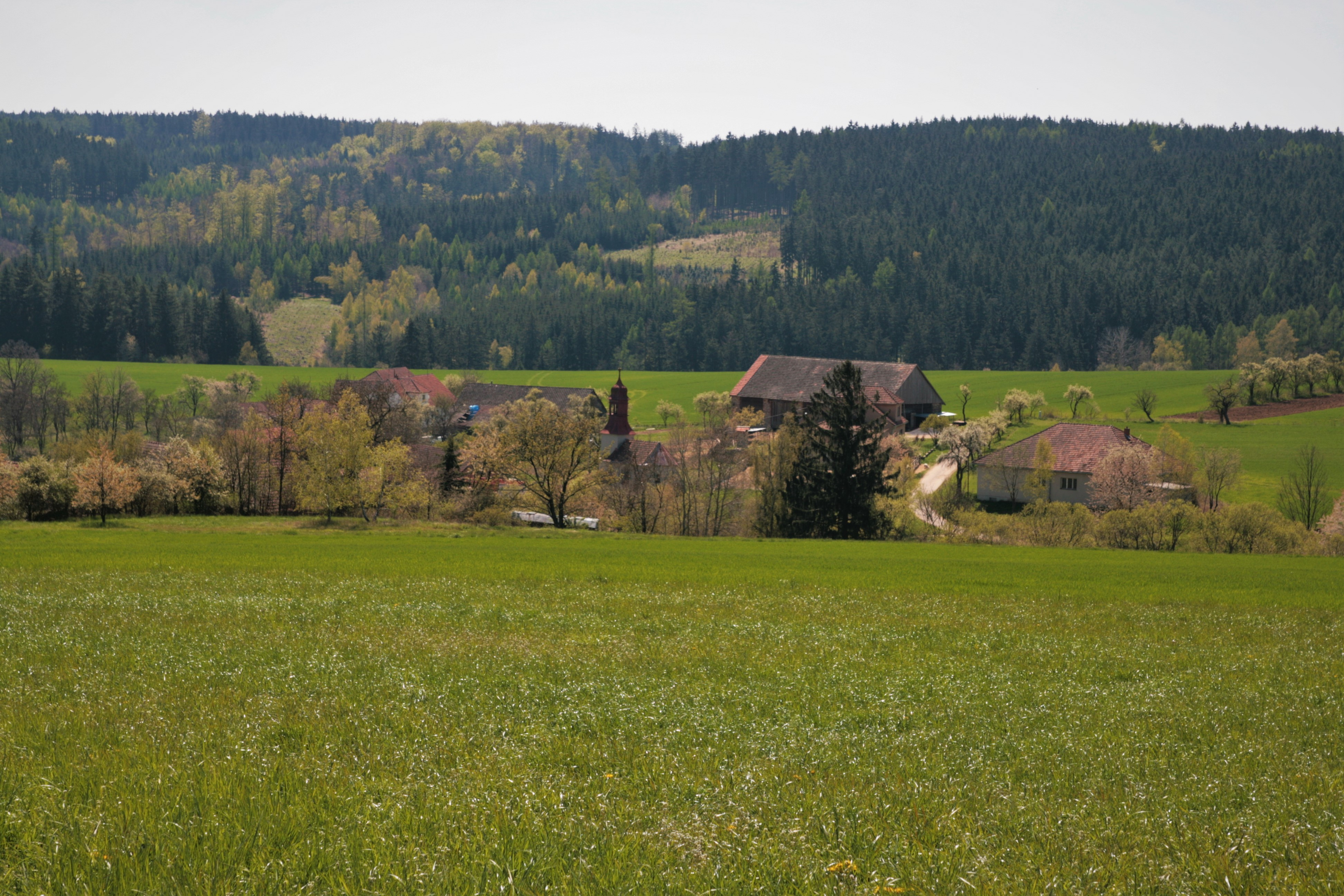 Vesnice Prosatín, část obce Kuřimská Nová Ves v okrese Brno-venkov. Pohled na ves s kaplí ze severu od příjezdové cesty.